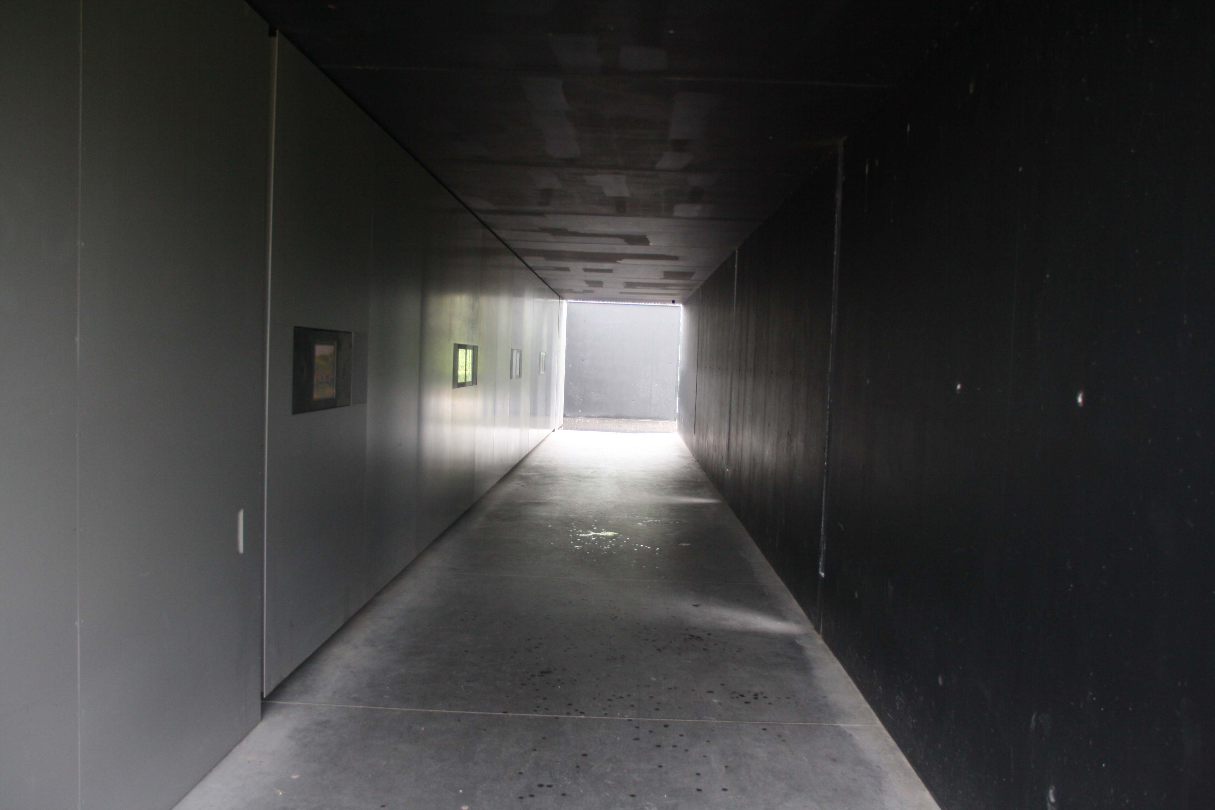 Mahnmal am Zugang zum deutschen Soldatenfriedhof Langemark